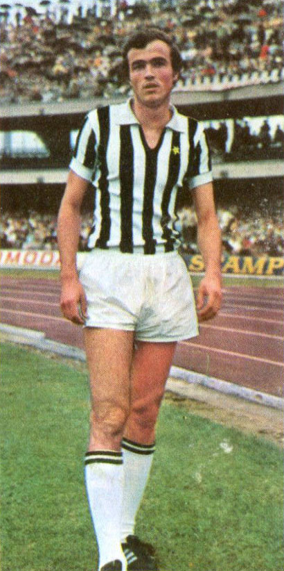 Verona, stadio Marcantonio Bentegodi, 30 agosto 1970. Il calciatore italiano Fausto Landini alla Juventus, in occasione della trasferta sul campo del Verona (1-1) valevole per il primo turno della Coppa Italia 1970-71.